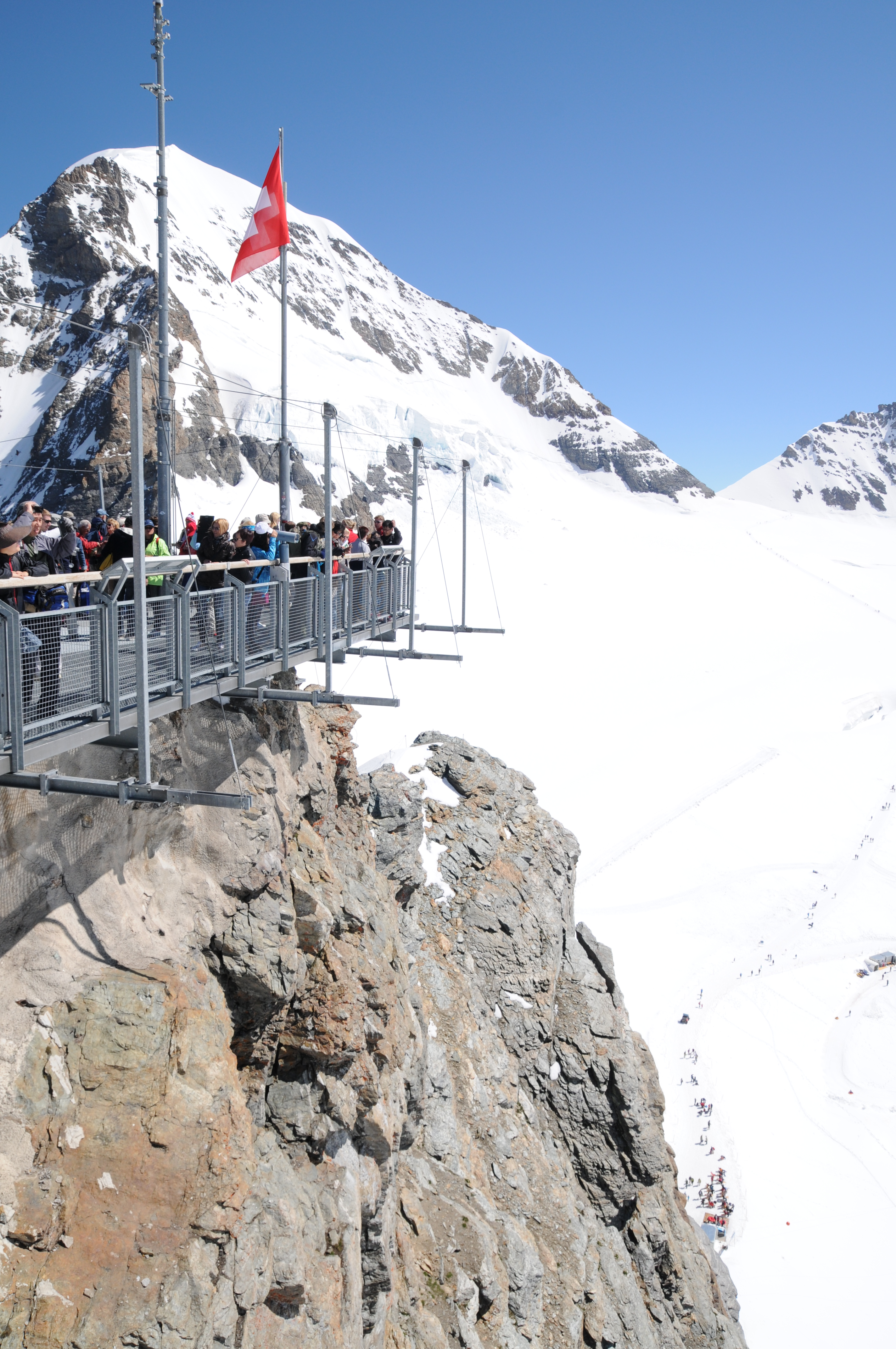 Berner Oberland. Observation platform at Jungfraujoch